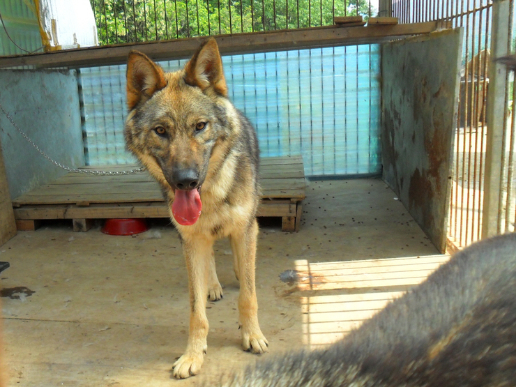 늑대아빠가 생산한 울프독 장군이